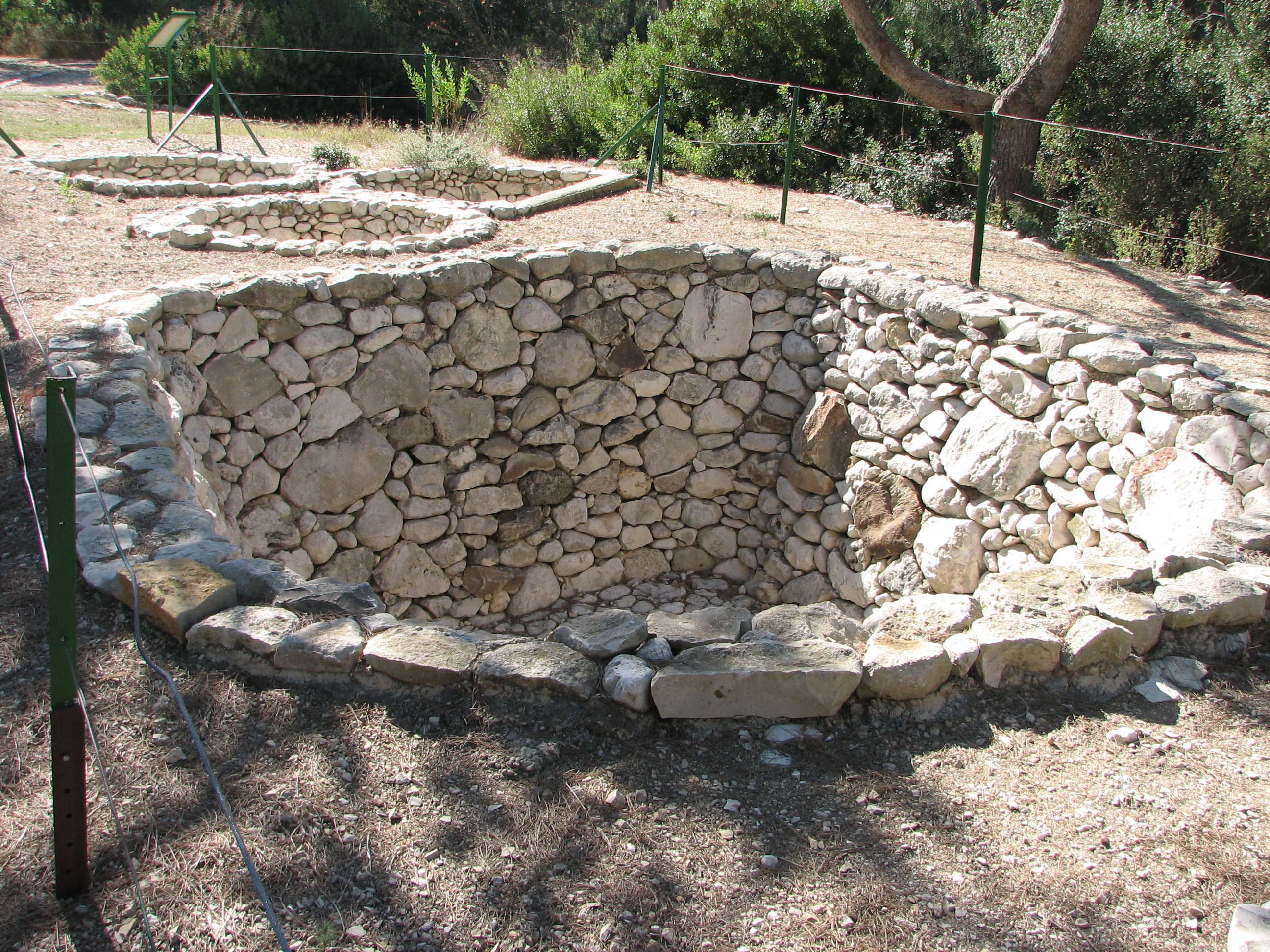 The Road of the Millennia - Archaeological Park, Hecht Museum, Haifa Israel Granaries for Storing Crops from an Israelite Fortress in the Negev. Iron Age 800-700BCE דרך הדורות הוא פארק ארכאולוגי ליד אוניברסיטת חיפה, אליו הועברו מבנים ומתקנים ארכאולוגים שמקומות שנועדו להריסה. אסמים לאחסון תבואה ממצודה ישראלית בנגב תקופת הברזל 700-800 לפני הספירה האסמים נצאו מחוץ למצודה שנבנתה בימי עוזיהו ומצאו סמוך לצומת דרכים חשוב